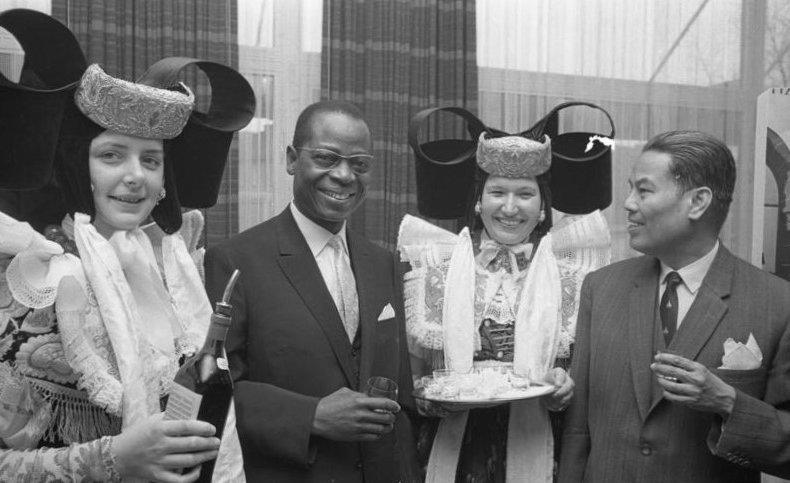 Das Diplom. Corps besucht die Ausst. "Reiseziele in Niedersachsen" in der La-Vertr. Ndsachsen